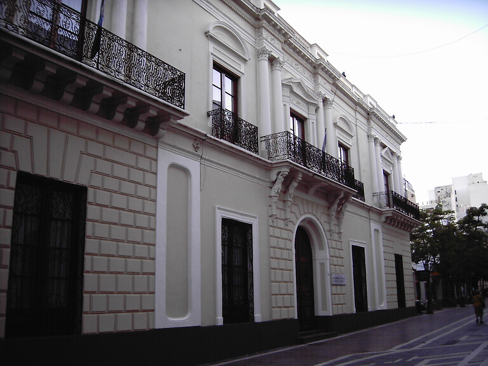 Facultad de Derecho, Córdoba, Argentina